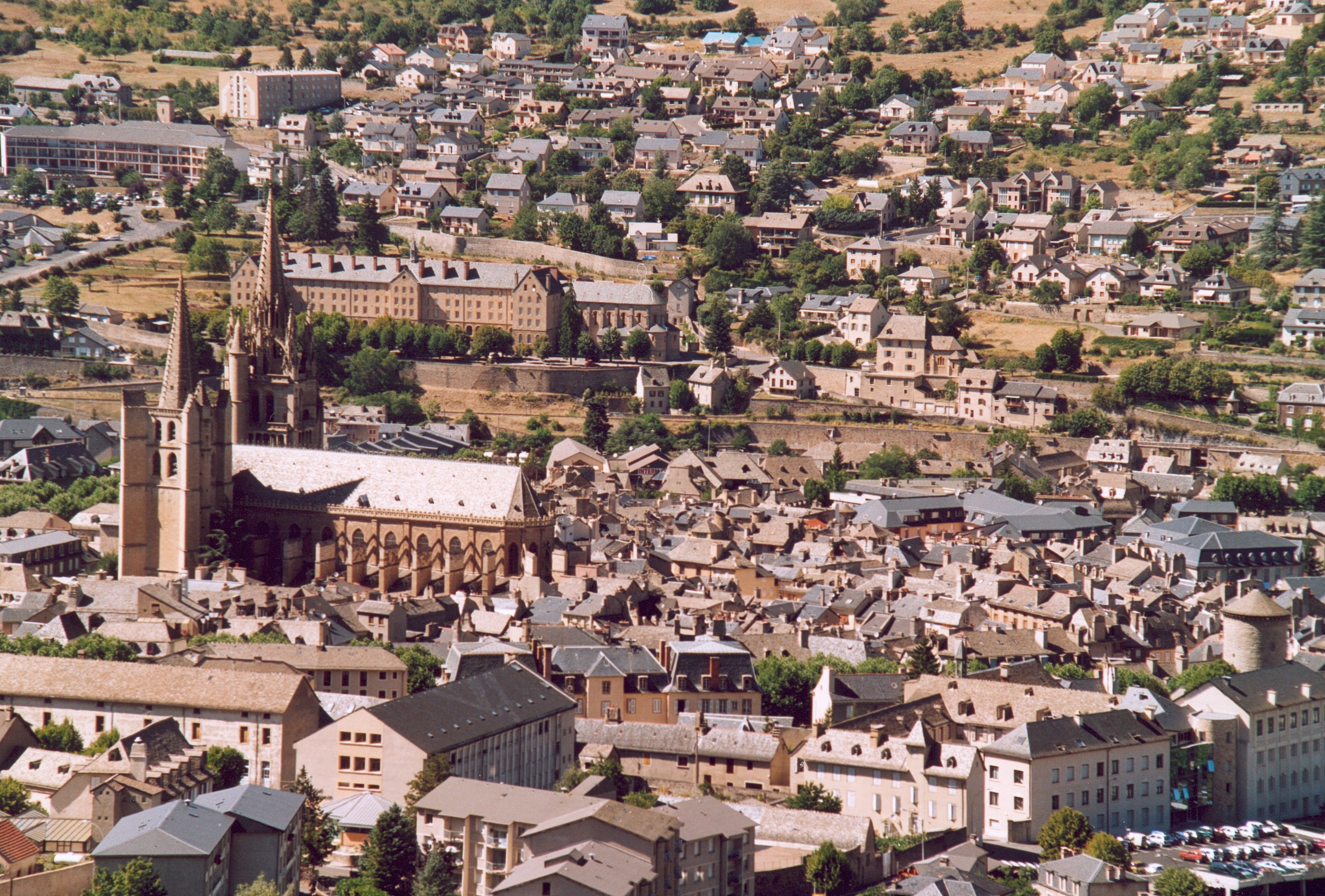 France Lozère Mende Photographie prise par GIRAUD Patrick Août 2005